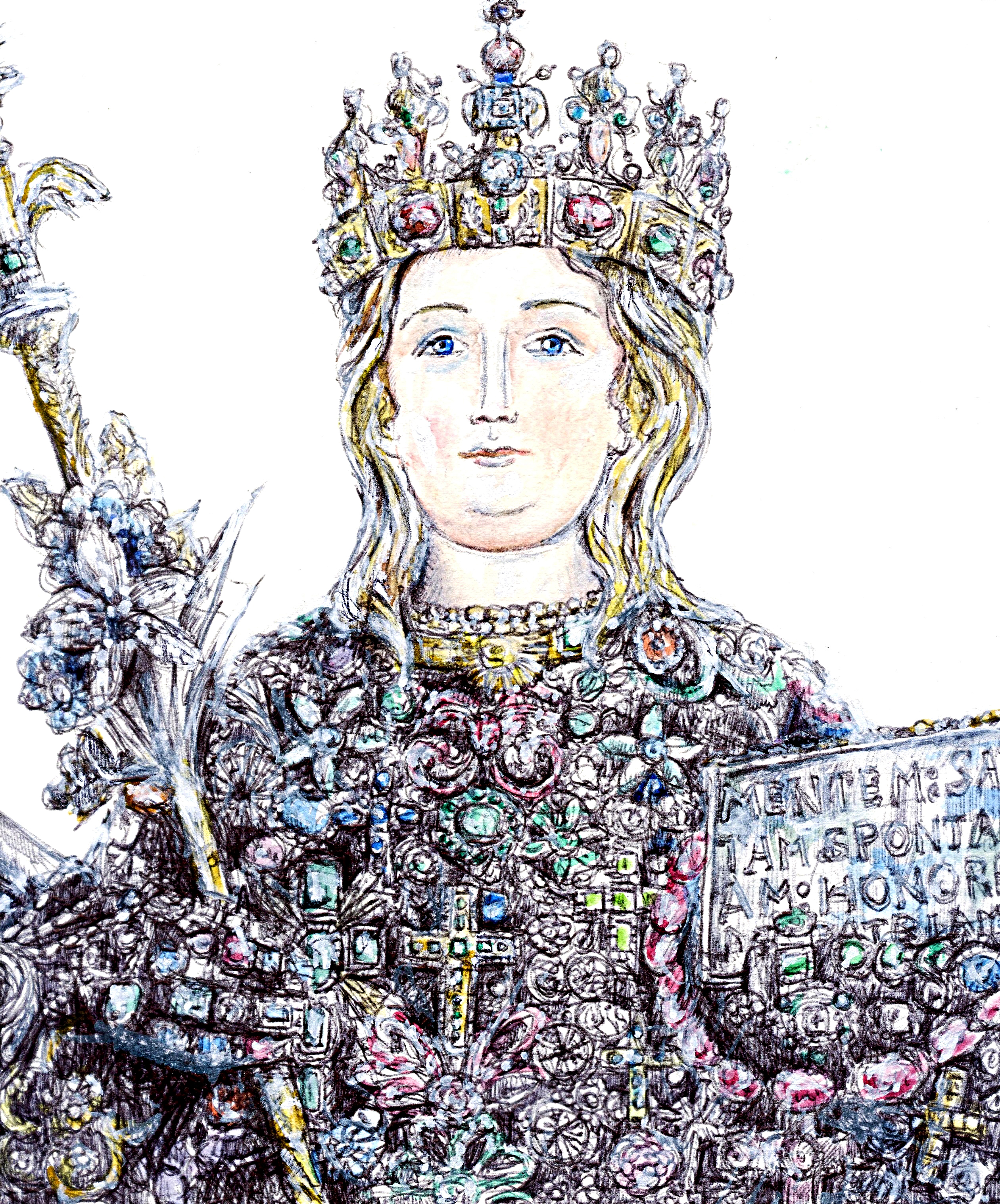 "Agatha", Sant'Agata vergine e martire di Catania, G. Guida, 2020